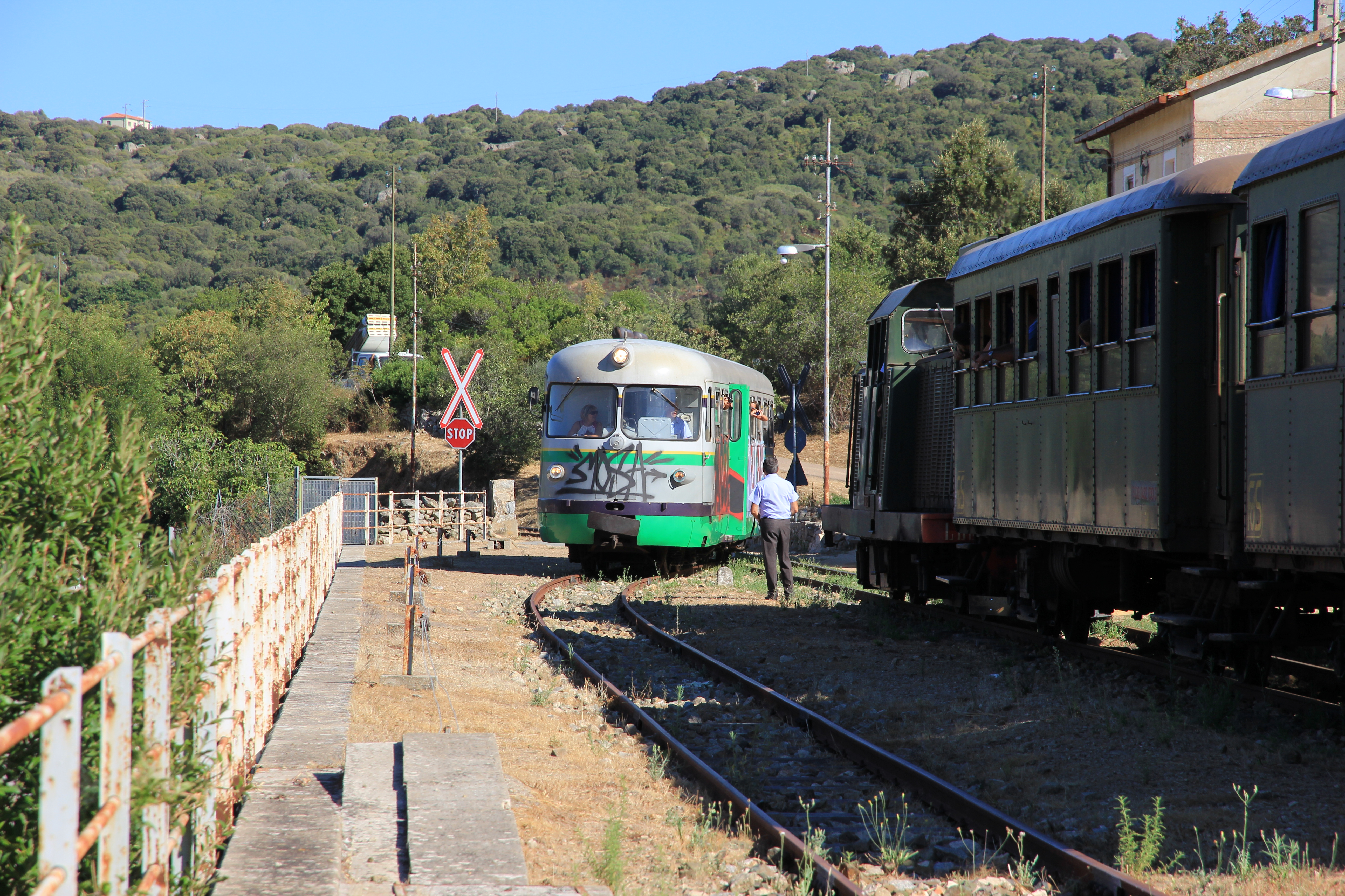 Sant'Antonio di Gallura, stazione ferroviaria